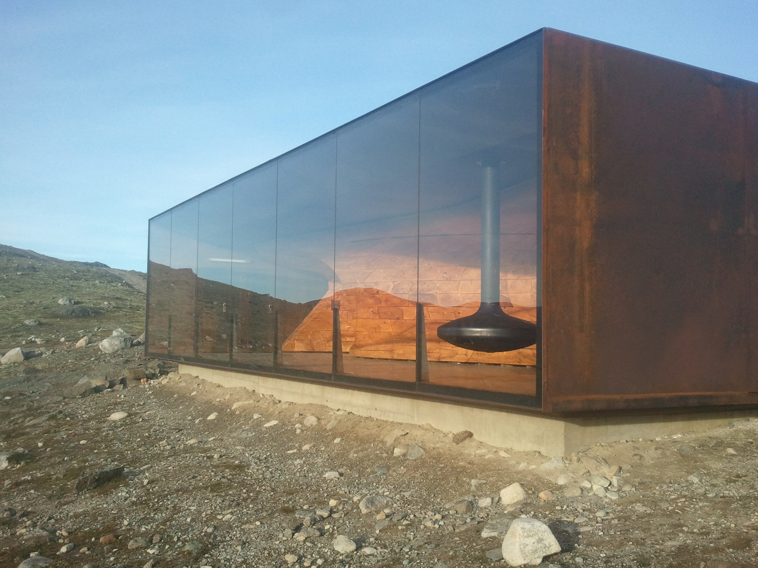 Utsiktspaviljongen Viewpoint Snøhetta